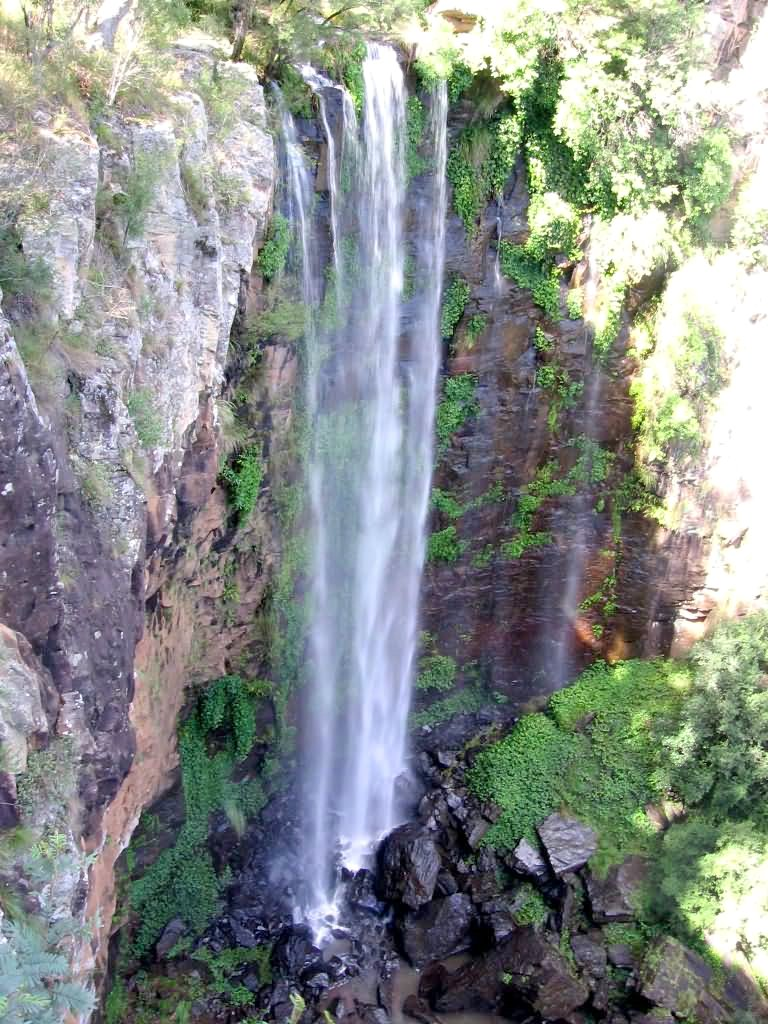 Chutes de la reine Mary; Parc national du Main Range; Queensland; Australie